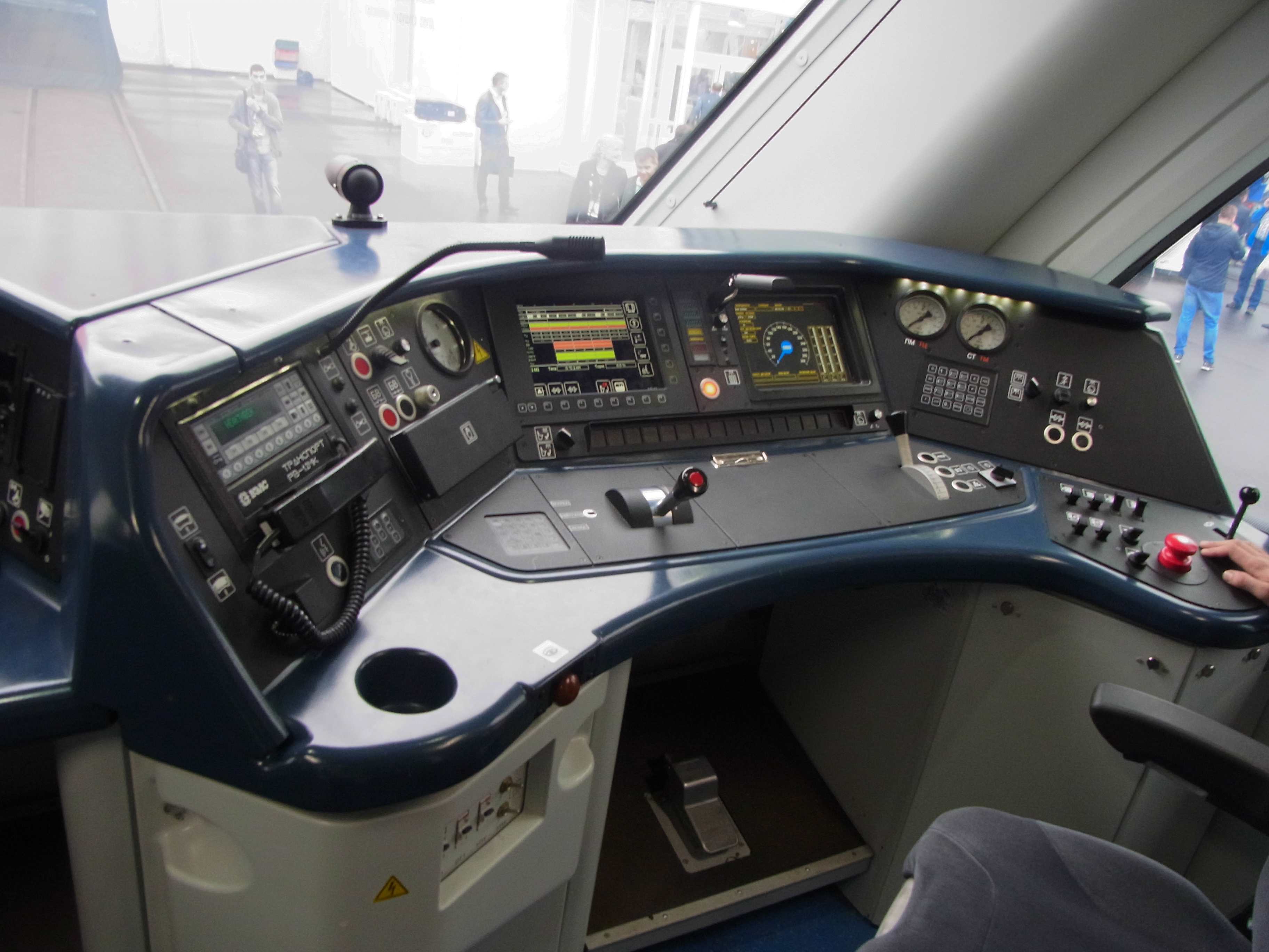 Пульт управления в кабине электропоезда ЭГ2Тв-001